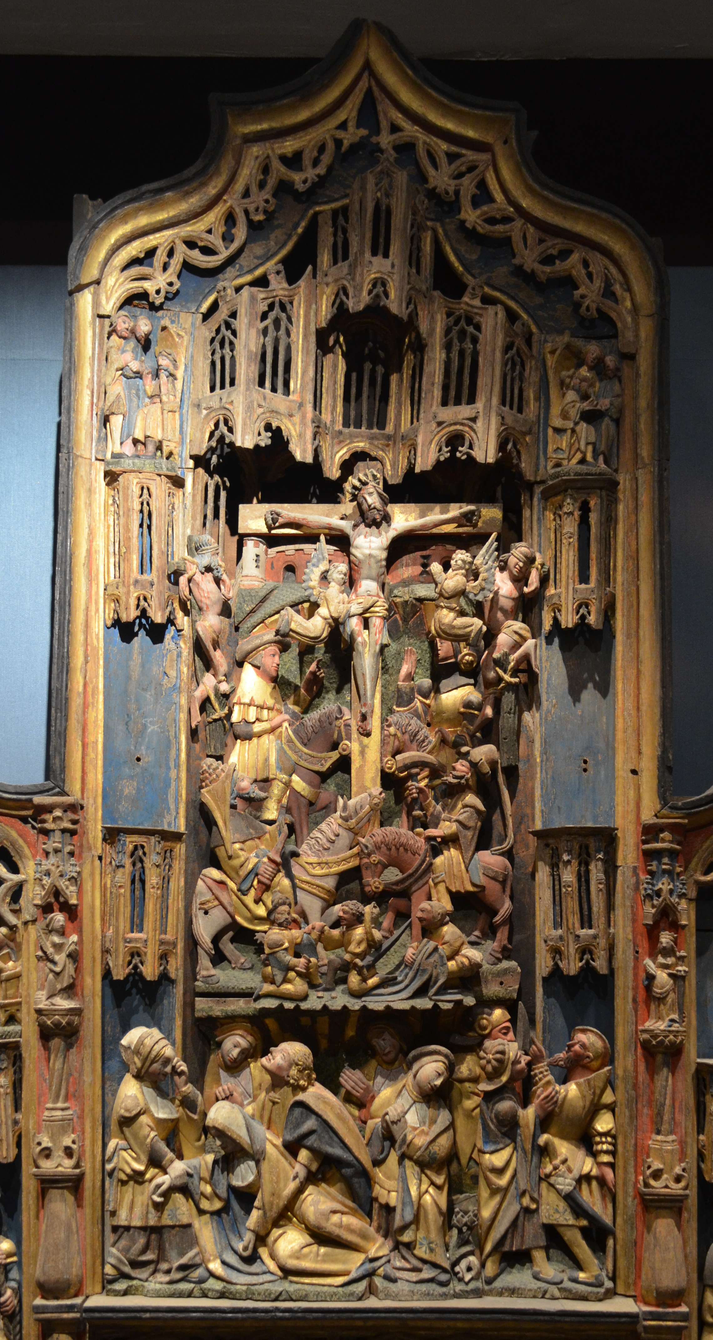 Retable provenant de la chapelle Saint-Laurent de Belvaux-sur-Lesse. Réalisé vers 1530-1540, il est attribué au Maître de Waha.